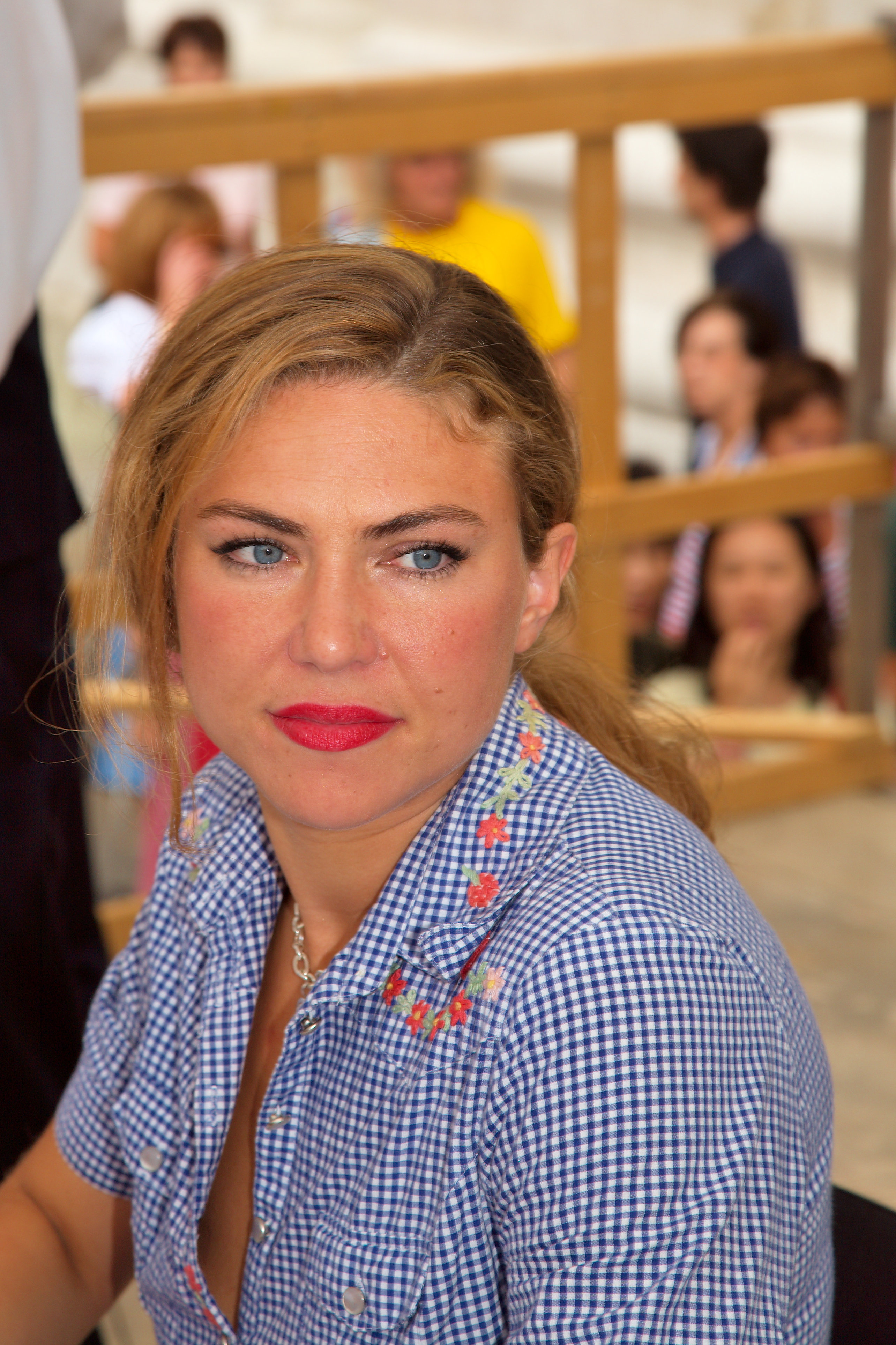 Annette Dasch during Salzburg festival 2008